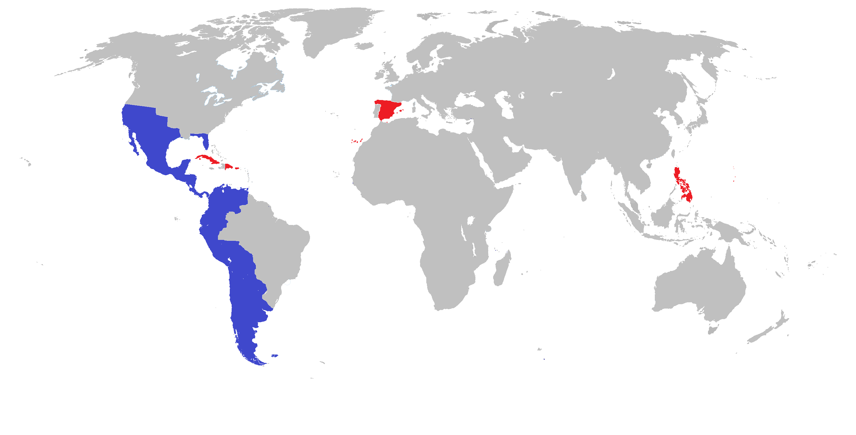 Expansion del imperio Español durante el Reinado de Fernando VII